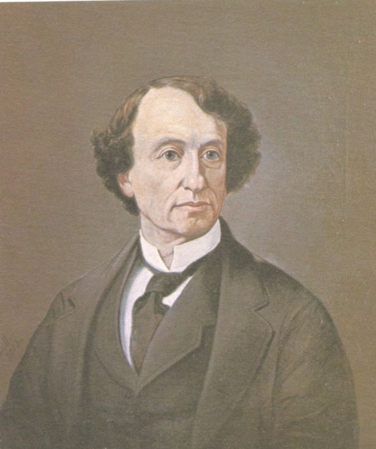 Portrait of Sir John A. Macdonald by Delos C. Bell, 1873 (Confederation Centre Art Gallery and Museum, Charlottetown, P.E.I.)